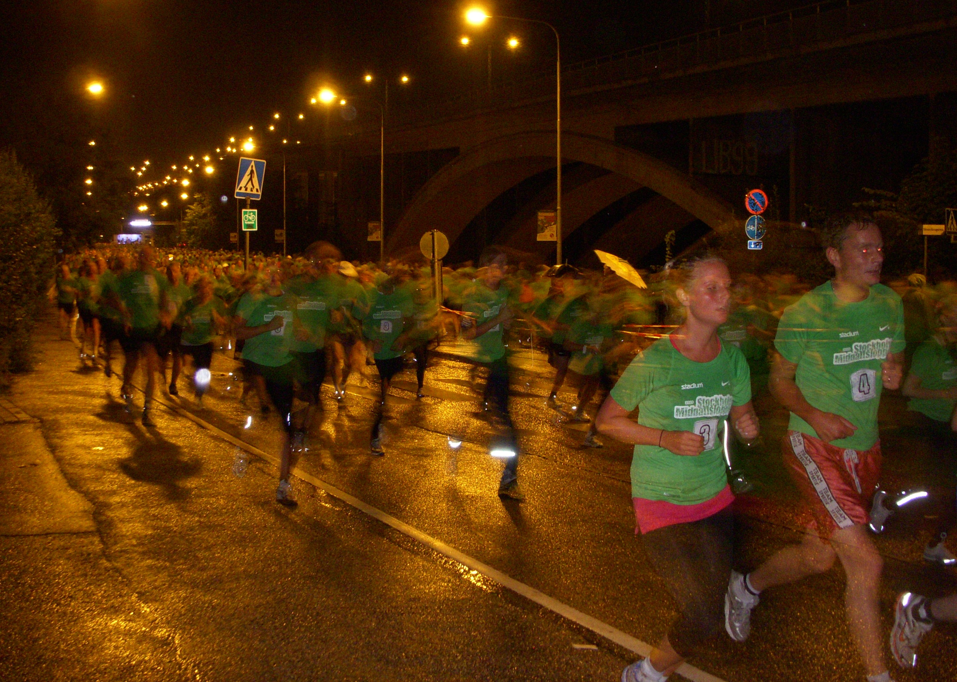 Midnattsloppet på Södermalm i Stockholm (Skansbrogatan)